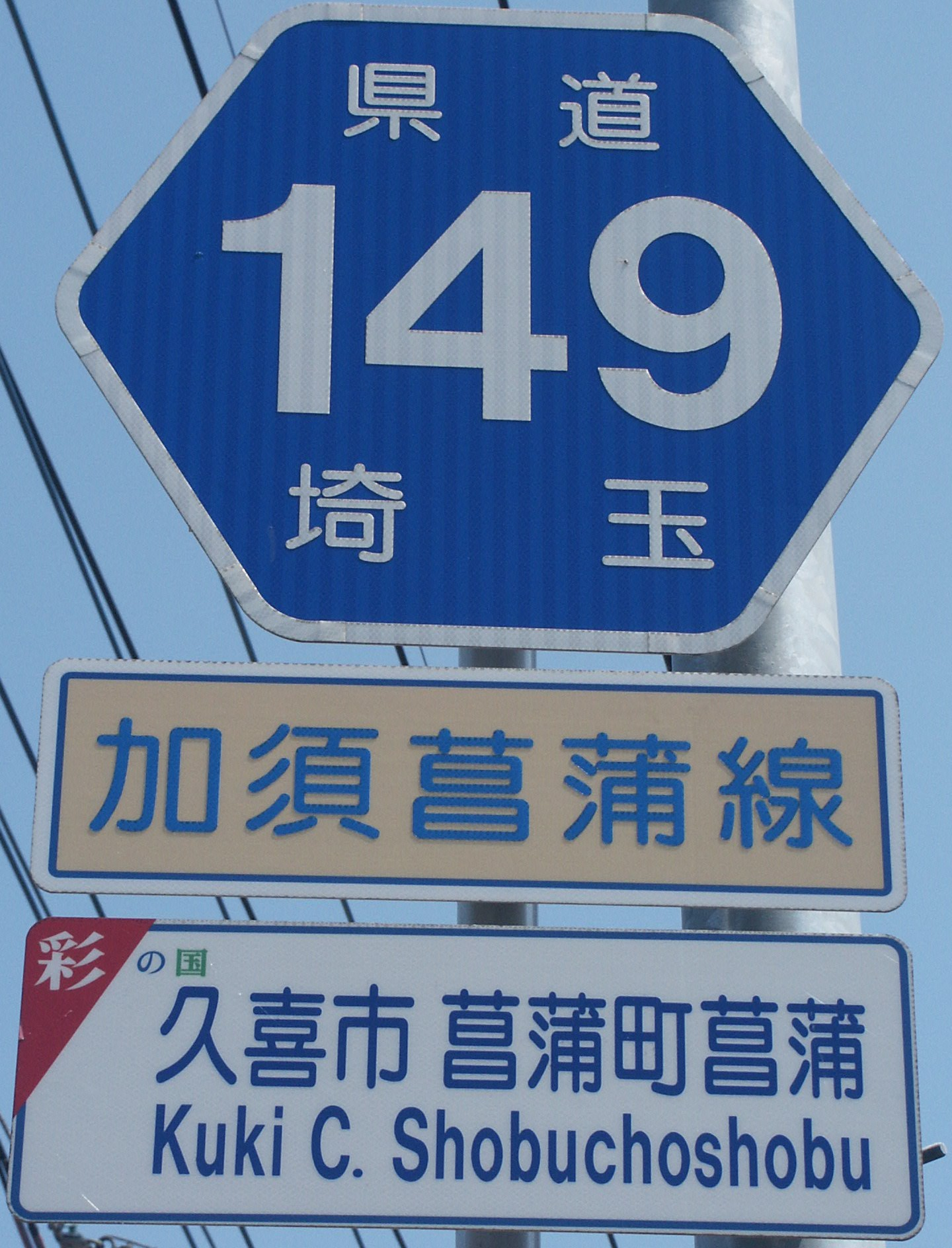 埼玉県道１４９号線の路線番号標識